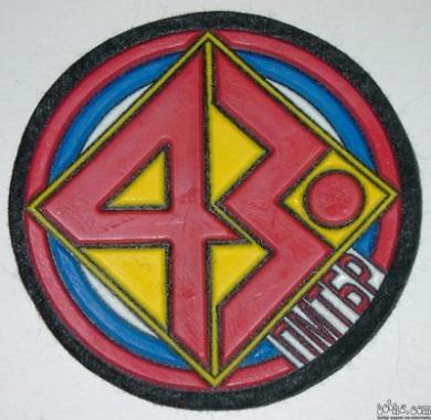 Ознака 43. пмтбр